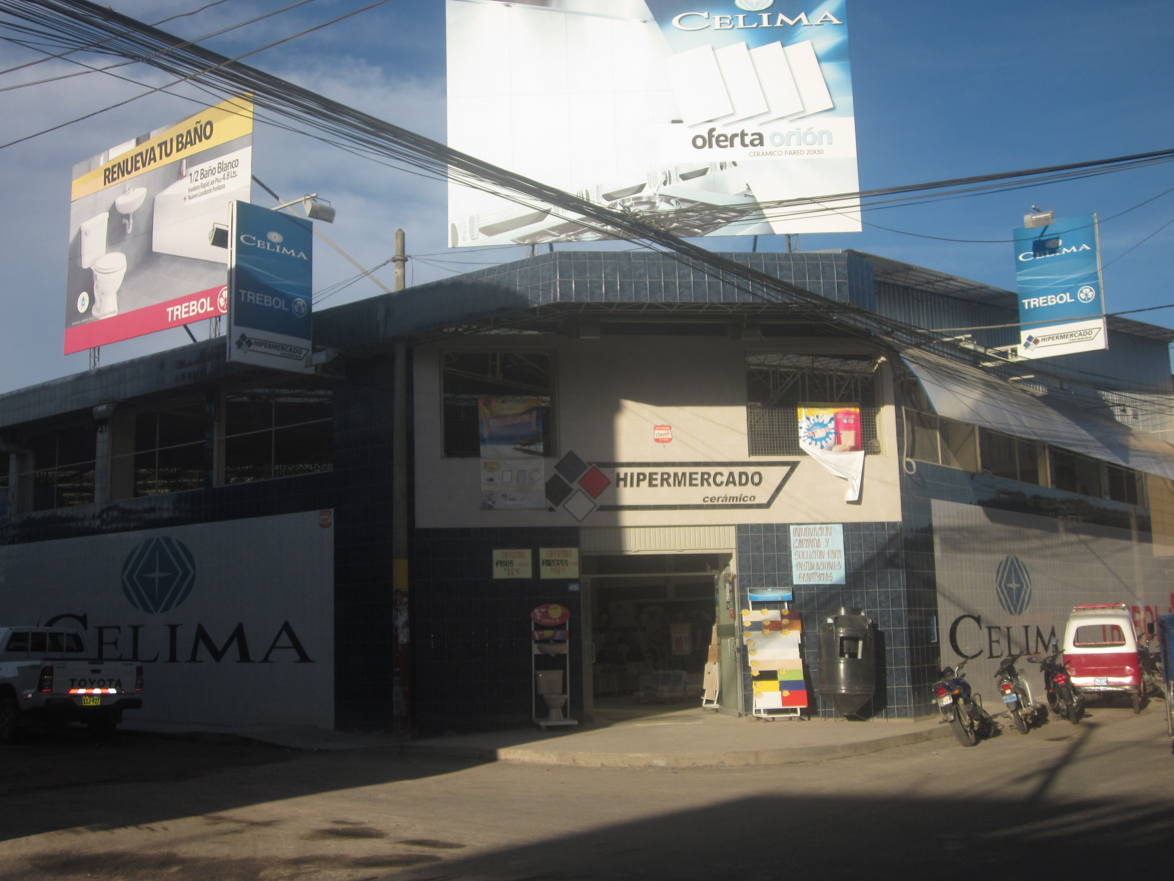 Primer Hipermercado en la region San Martin en Moyobamba